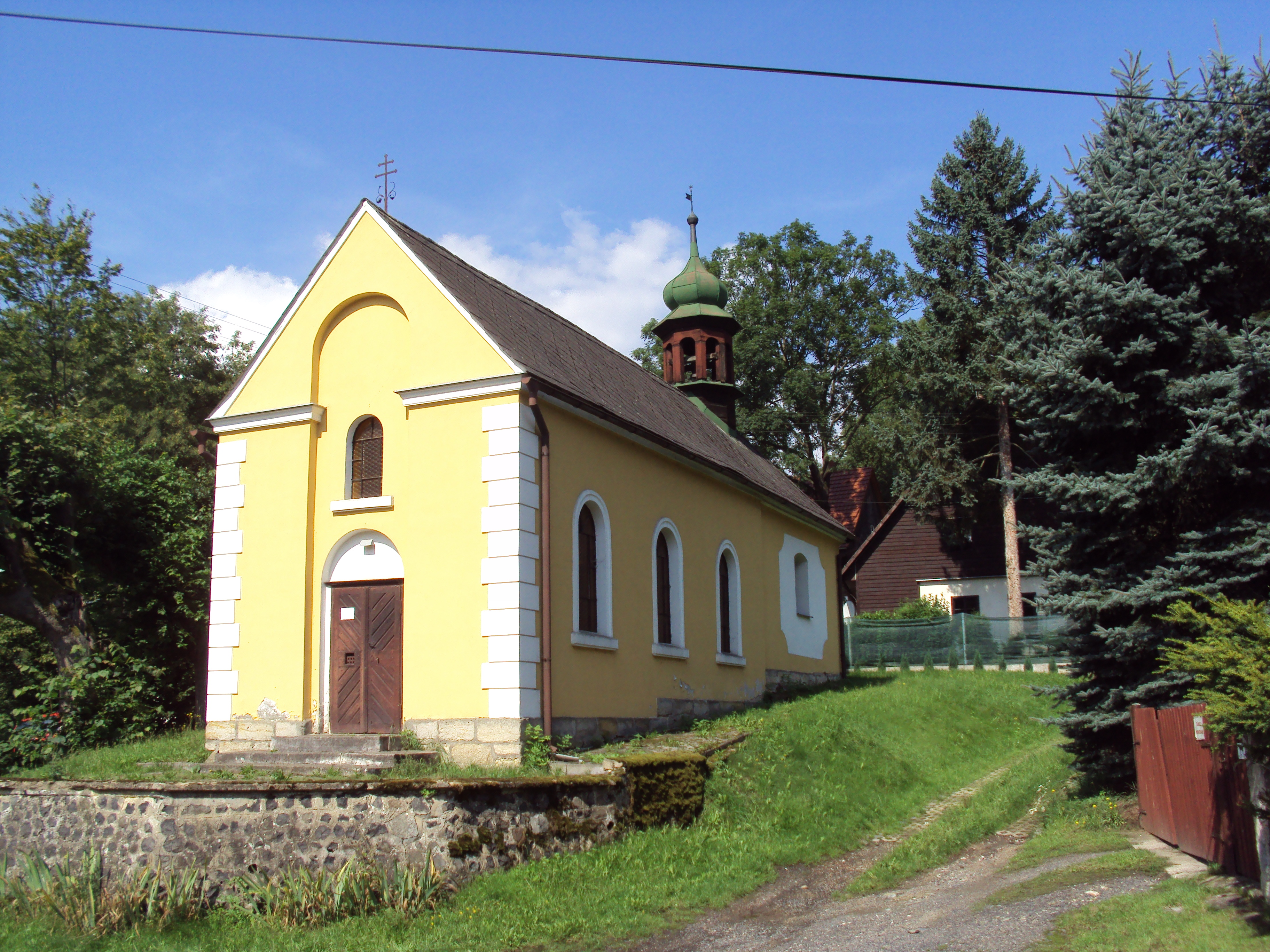 Kaple Nejsvětější trojice uprostřed vesnice Častolovice, připojené k městu Česká Lípa